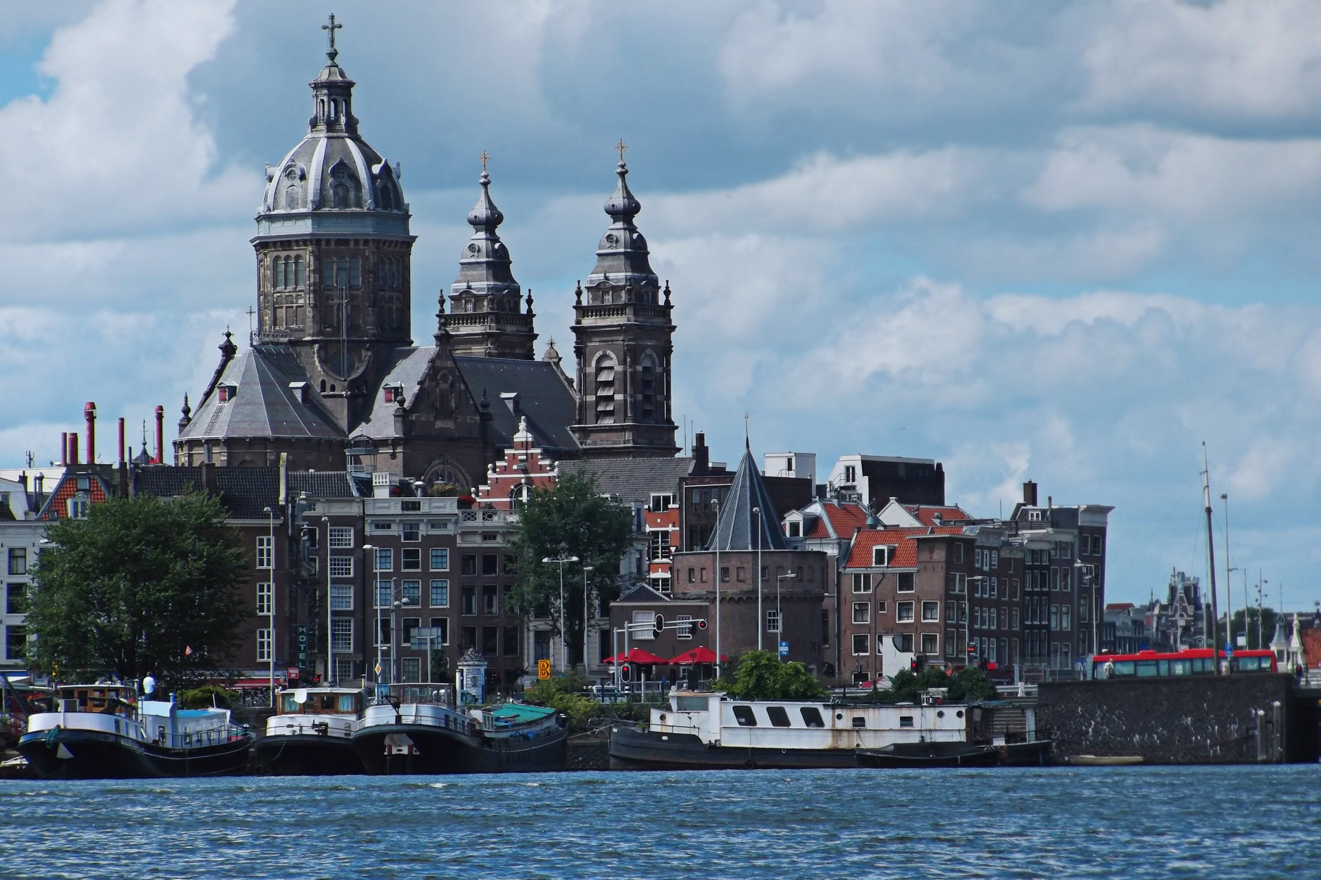 Amsterdam